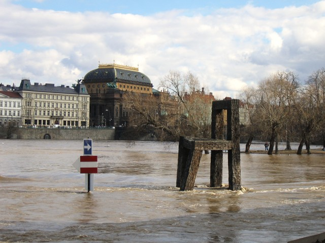 Povodeň v Praze na jaře 2006 už ustoupila. Hladina Vltavy je ještě vzedmutá a pražané ji chodí okukovat. Na snímku "socha" židle a v pozadí Národní divadlo.